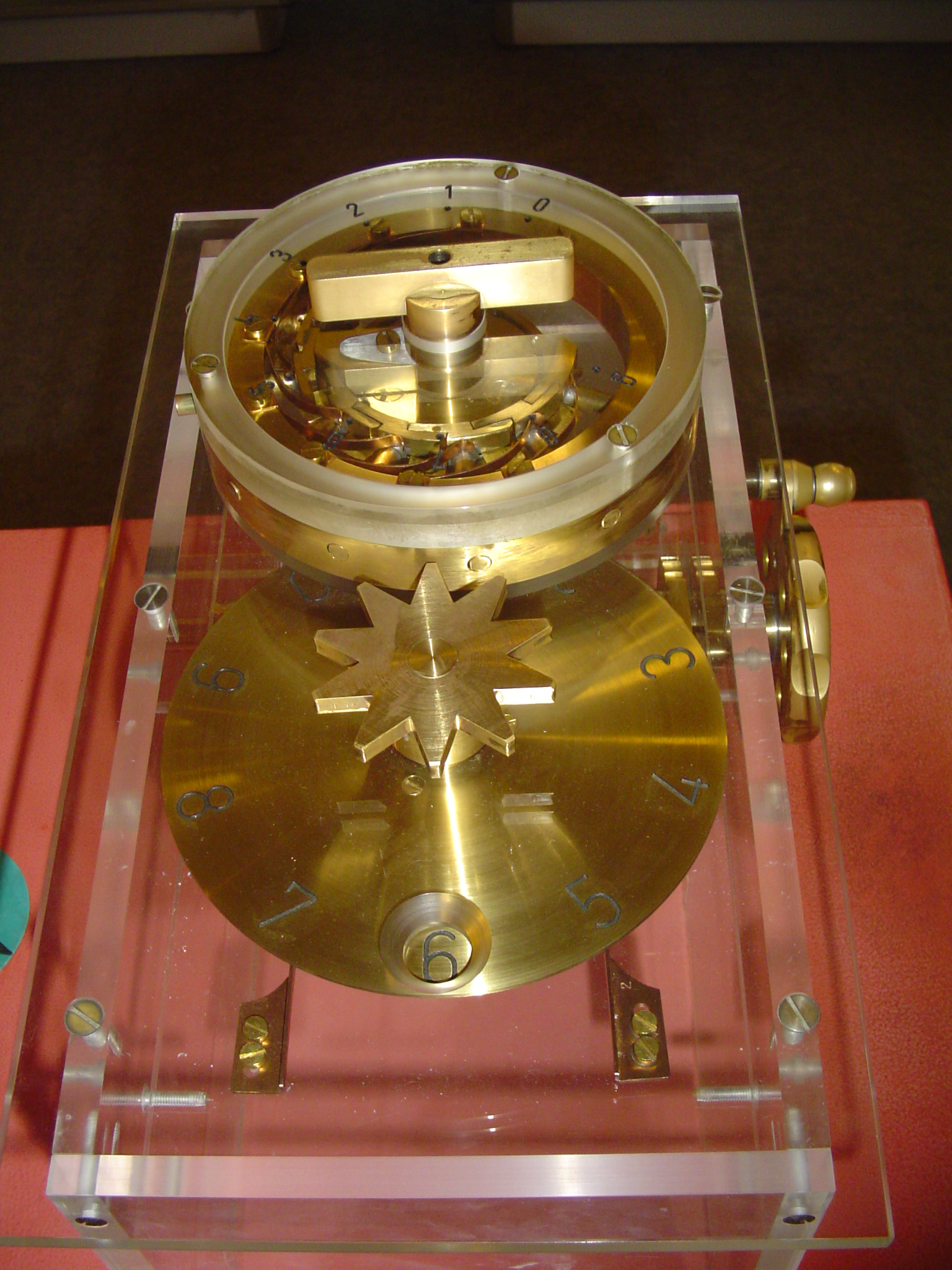 Modell einer Sprossenradrecheneinheit